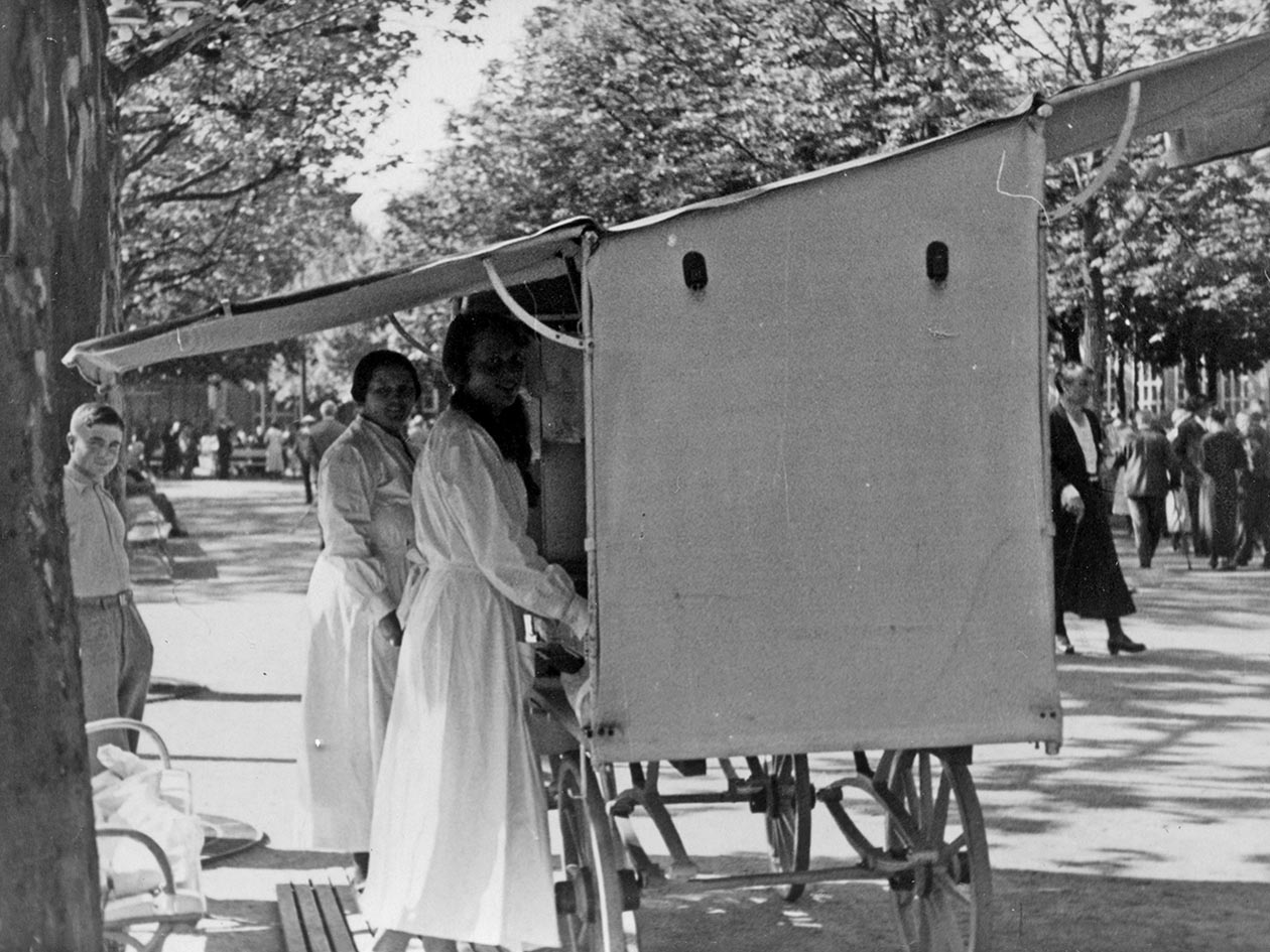 Gebäckverkauf im Kurgarten von Bad Kissingen 1933 (im Bildvrodergrund Liselotte Meisner)